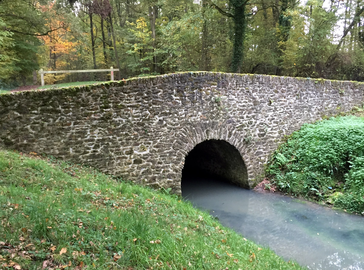 Aqueduc de Vieille Eglise (Yvelines)